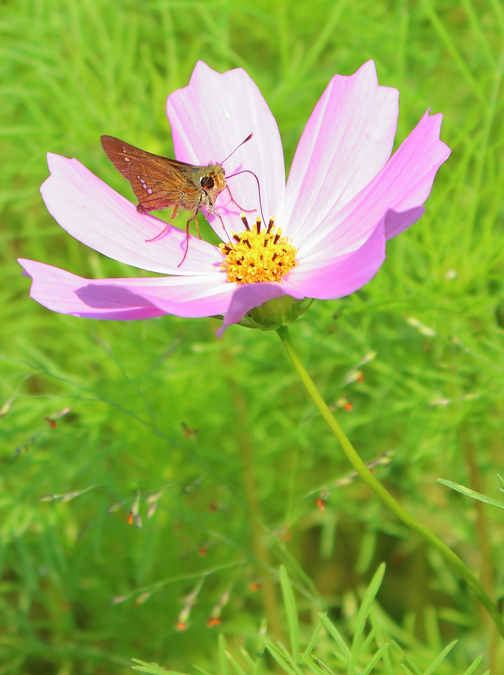 コスモスとイチモンジセセリ（埼玉県日高市「巾着田」）